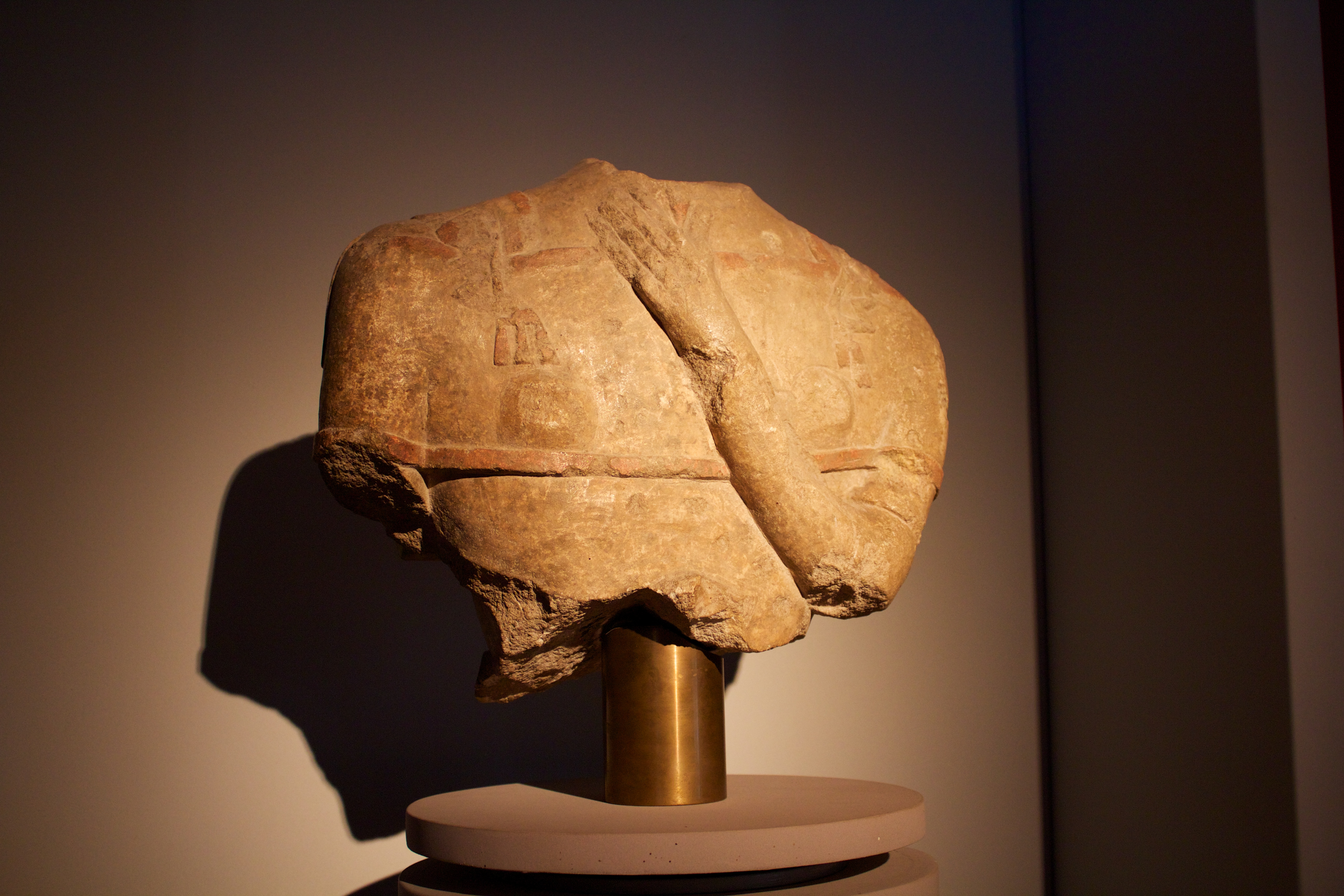 Torsetto femminile, Museo archeologico nazionale d'Abruzzo, Chieti